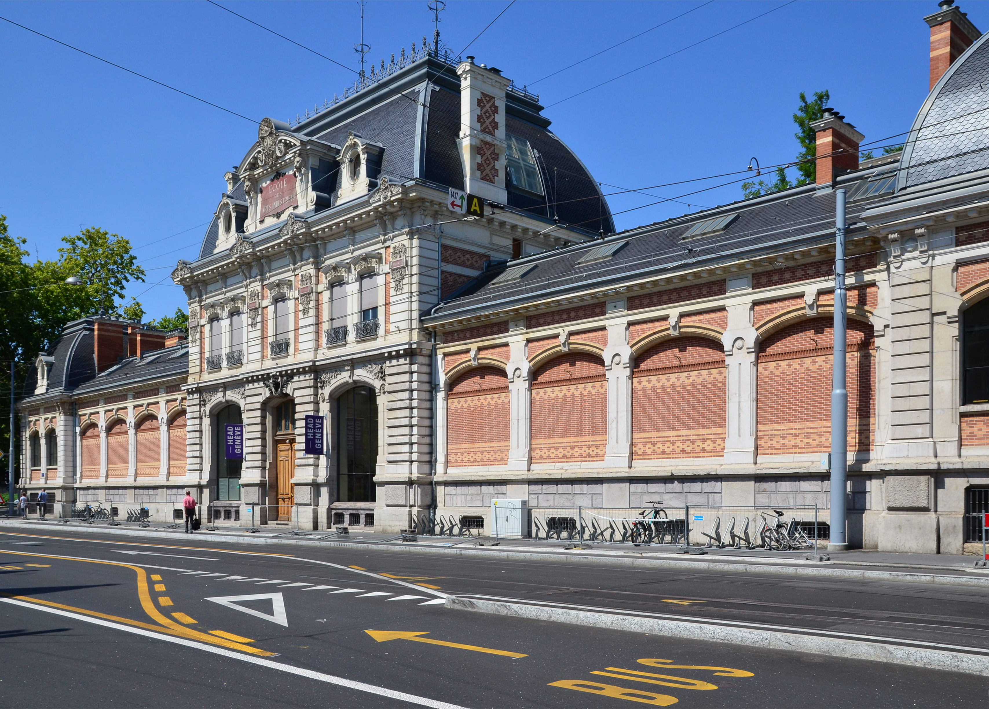 Ancienne école des arts industriels, Genève